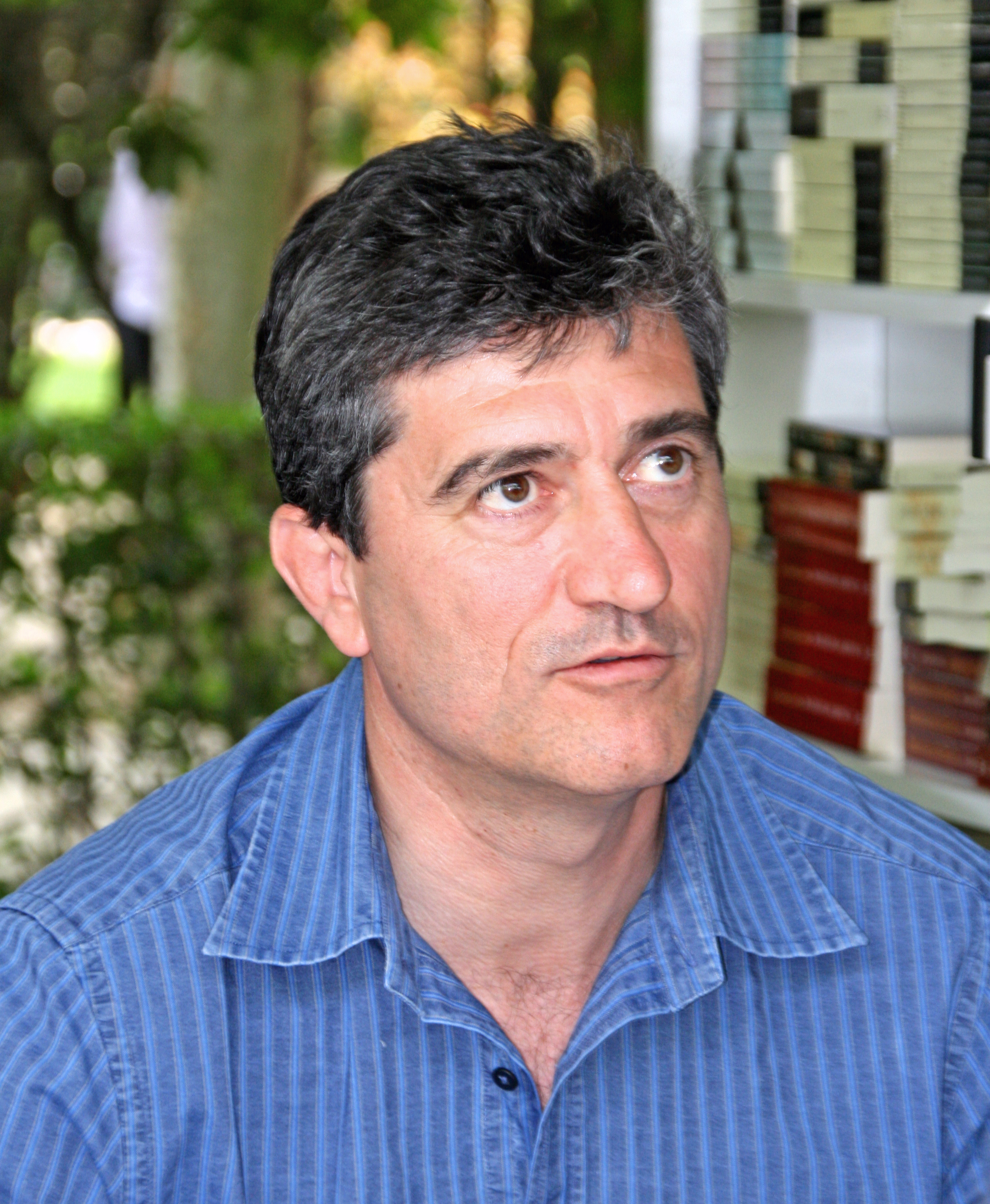 Guillermo Fesser en la Feria del Libro de Madrid, 6 de junio de 2008.